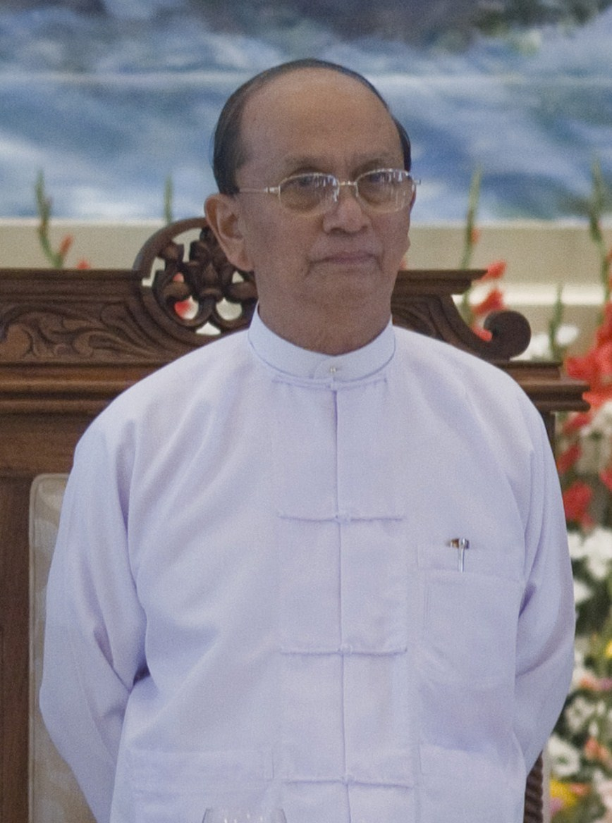 นายกรัฐมตรีพม่าเป็นเจ้าภาพเลี้ยงอาหารกลางวันเพื่อเป็นเกียรติแก่นายกรัฐมนตรีและคณะ ณ ห้องจัดเลี้ยง เรือนรับรอง Zeyarthiri Beikman นครเนปิดอว์ สหภาพพม่า วันจันทร์ ที่ 11 ตุลาคม พ.ศ.2553 (Photographer attached to the Prime Minister of the Kingdom of Thailand : Peerapat Wimolrungkarat / พีรพัฒน์ วิมลรังครัตน์)